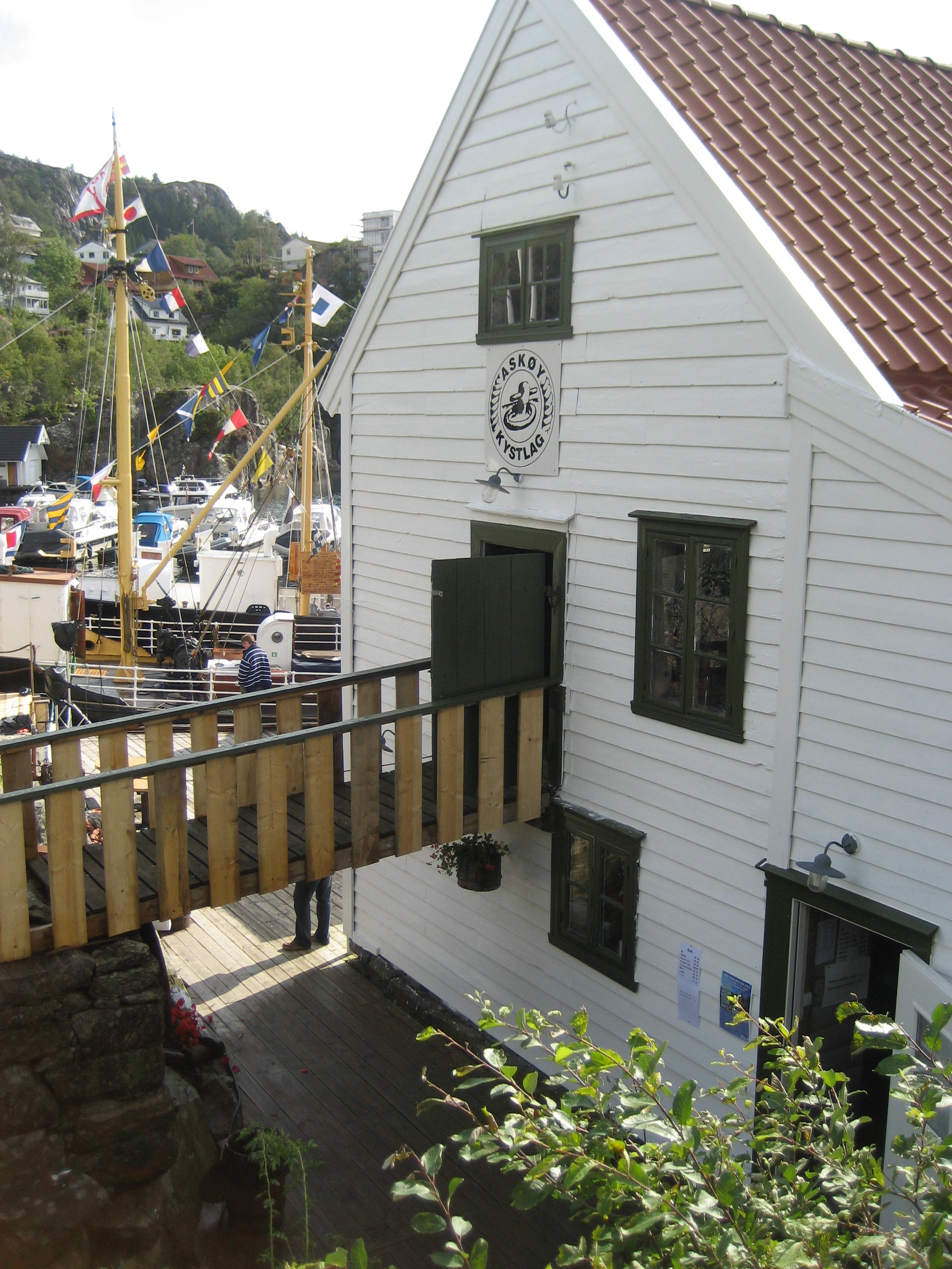 Askøy Kystlag sitt naust